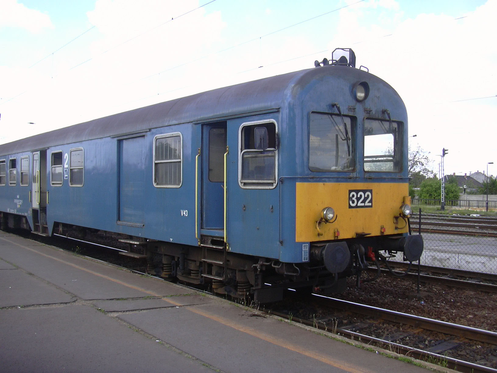 BDt 300-as sorozatú vezérlőkocsi Füzesabony állomáson